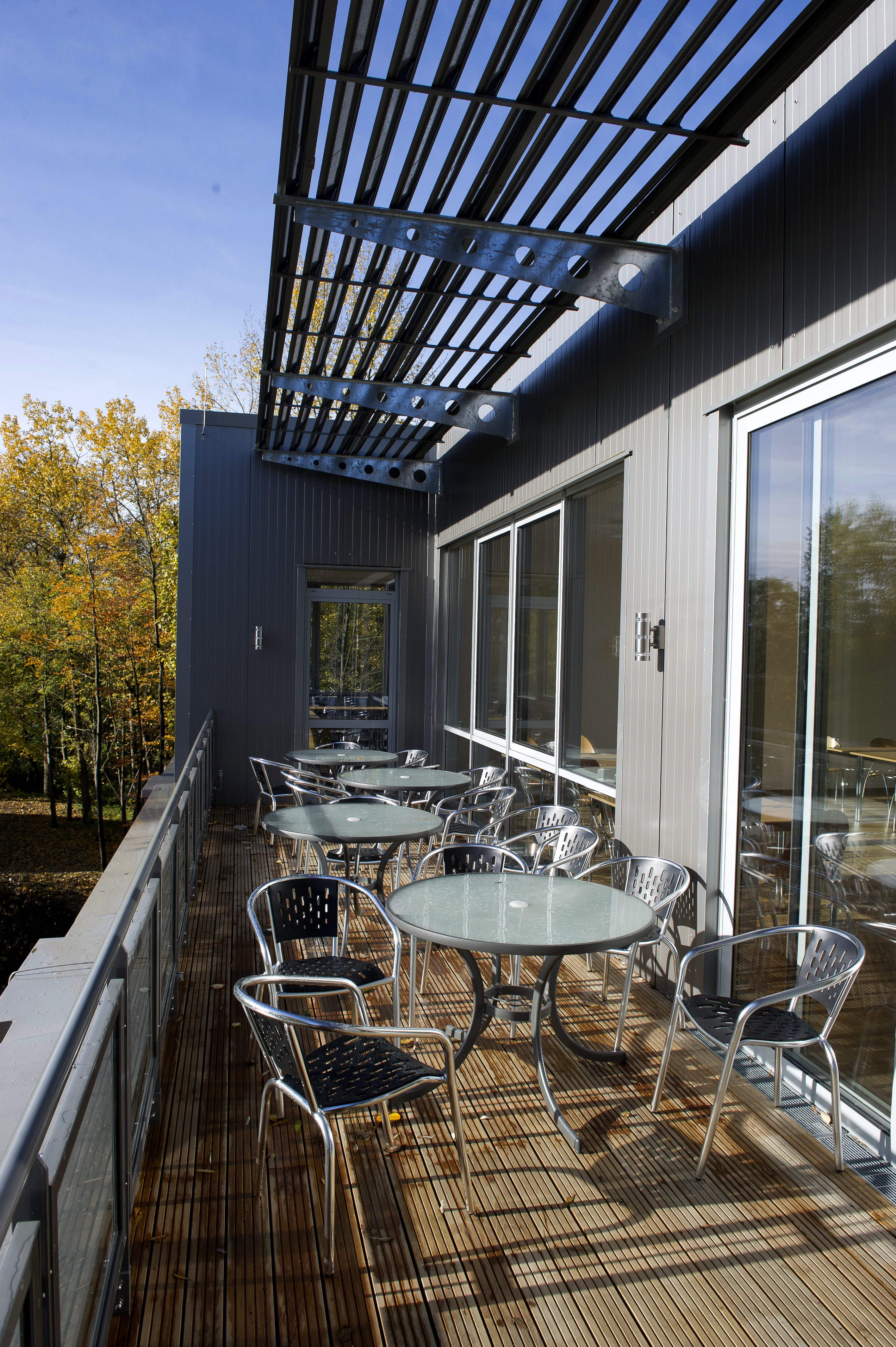 Terrasse der NORDAKADEMIE-Mensa